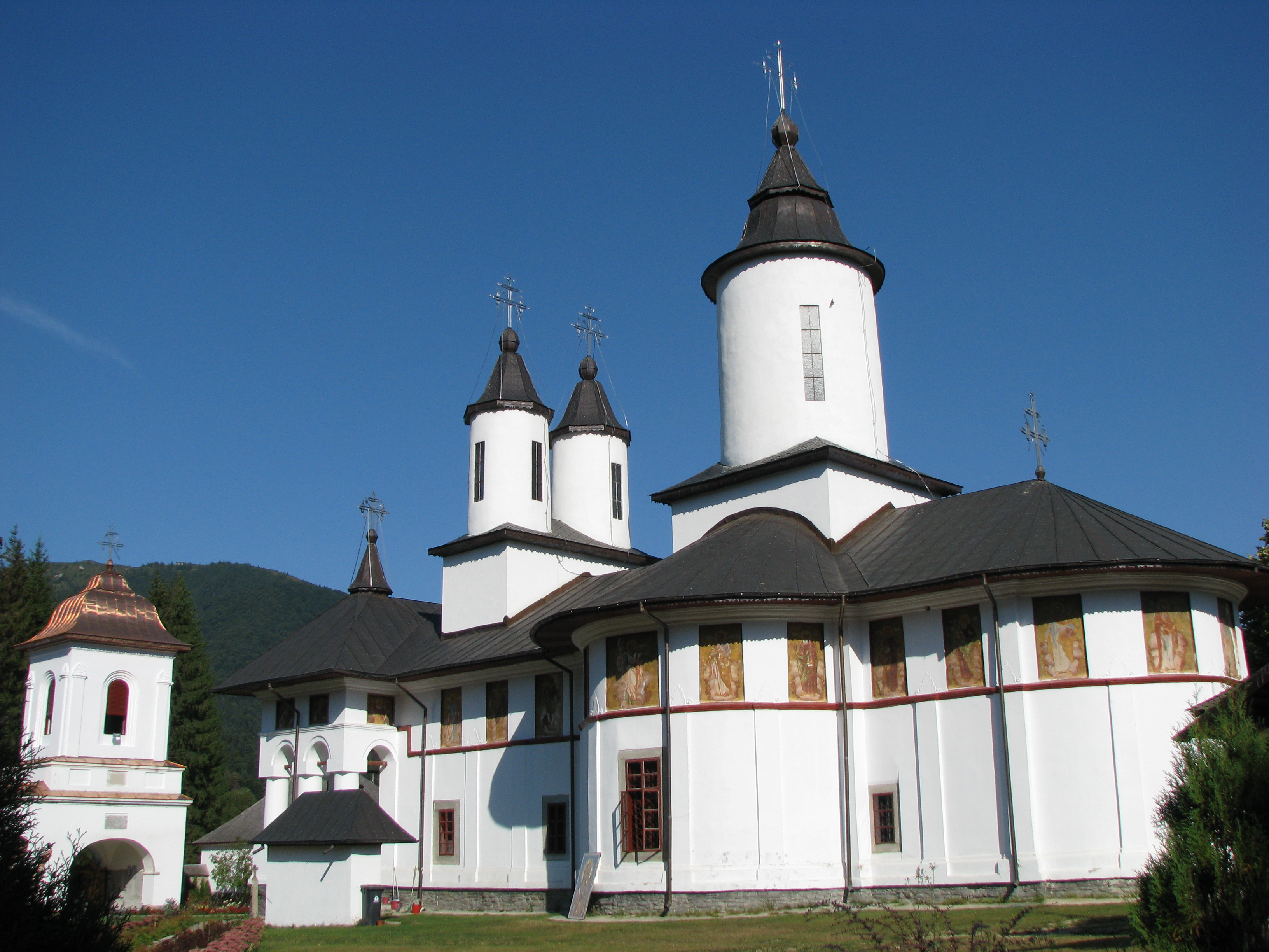 Cheia -Manastirea 01